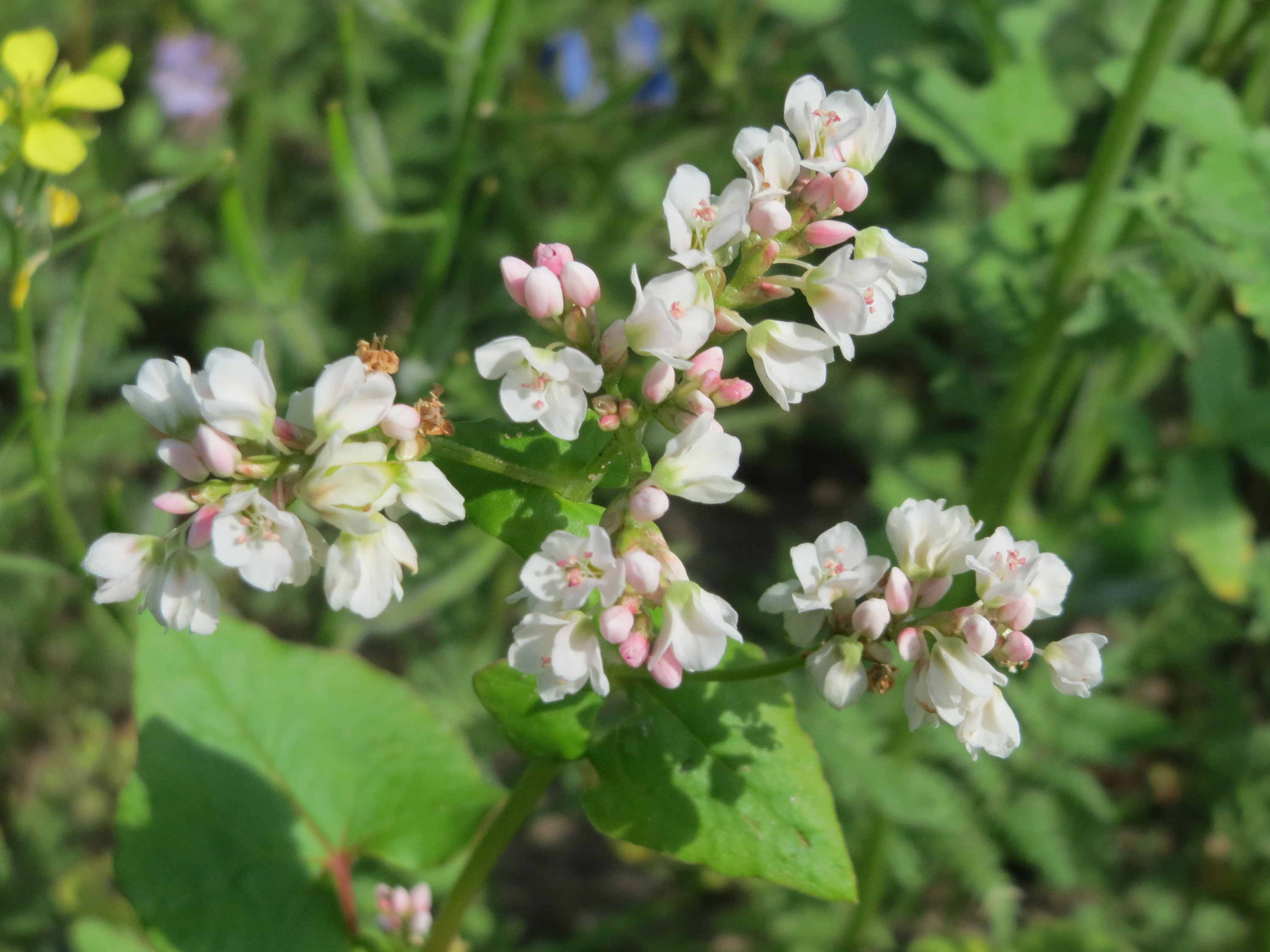 Echter Buchweizen (Fagopyrum esculentum) bei Reilingen